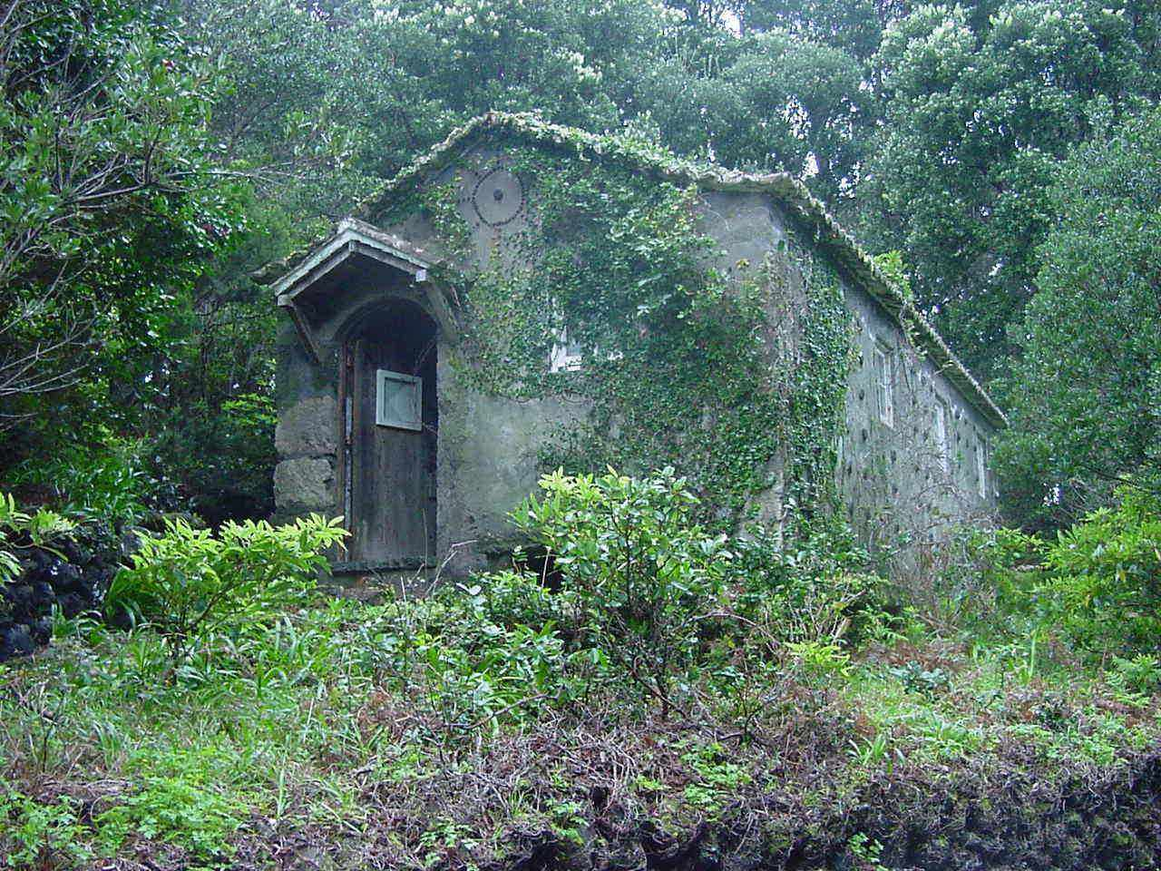 Adega tradicional, antigas vinhas junto ao Farol da Serreta, ilha Terceira, Açores, Portugal.